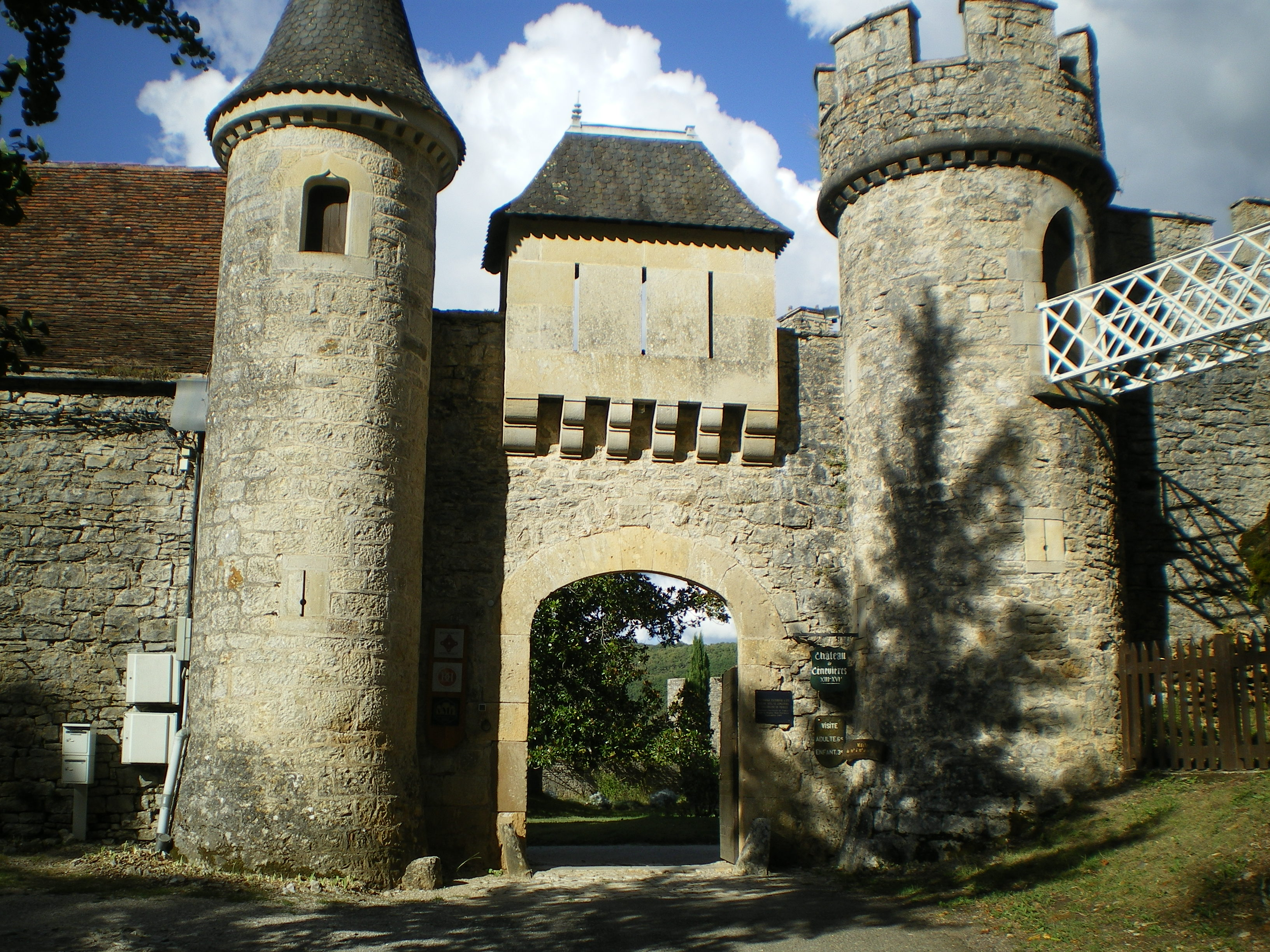 Château de Cénevières, Lot, France